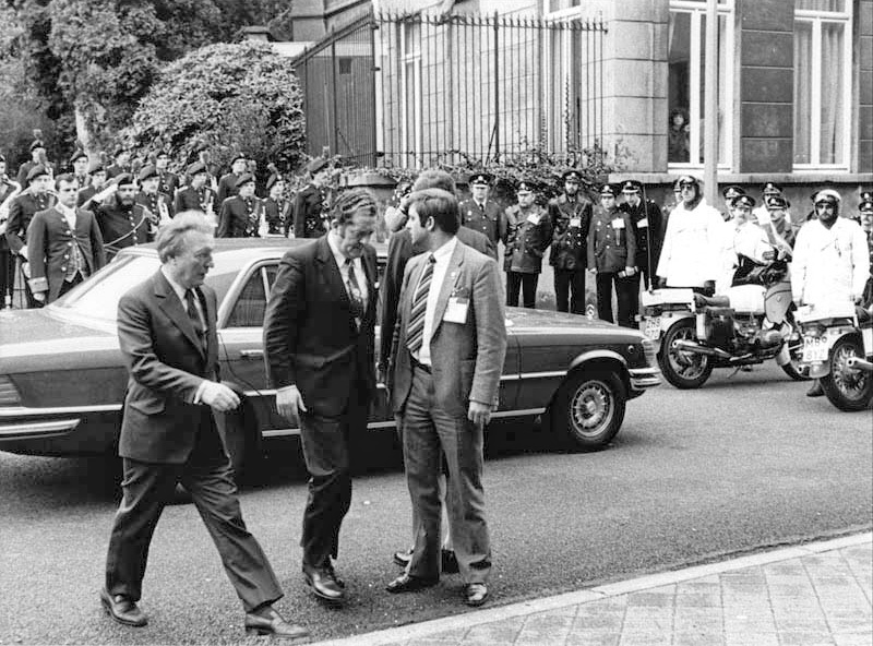 Aankomst van de Ierse premier Charles Haughey bij het Gouvernementsgebouw in Maastricht bij gelegenheid van de 'Eurotop' van de Europese Raad, gehouden in het stadhuis van Maastricht op 23 en 24 maart 1981. Fotocollectie RHCL Maastricht, GAM 20881.